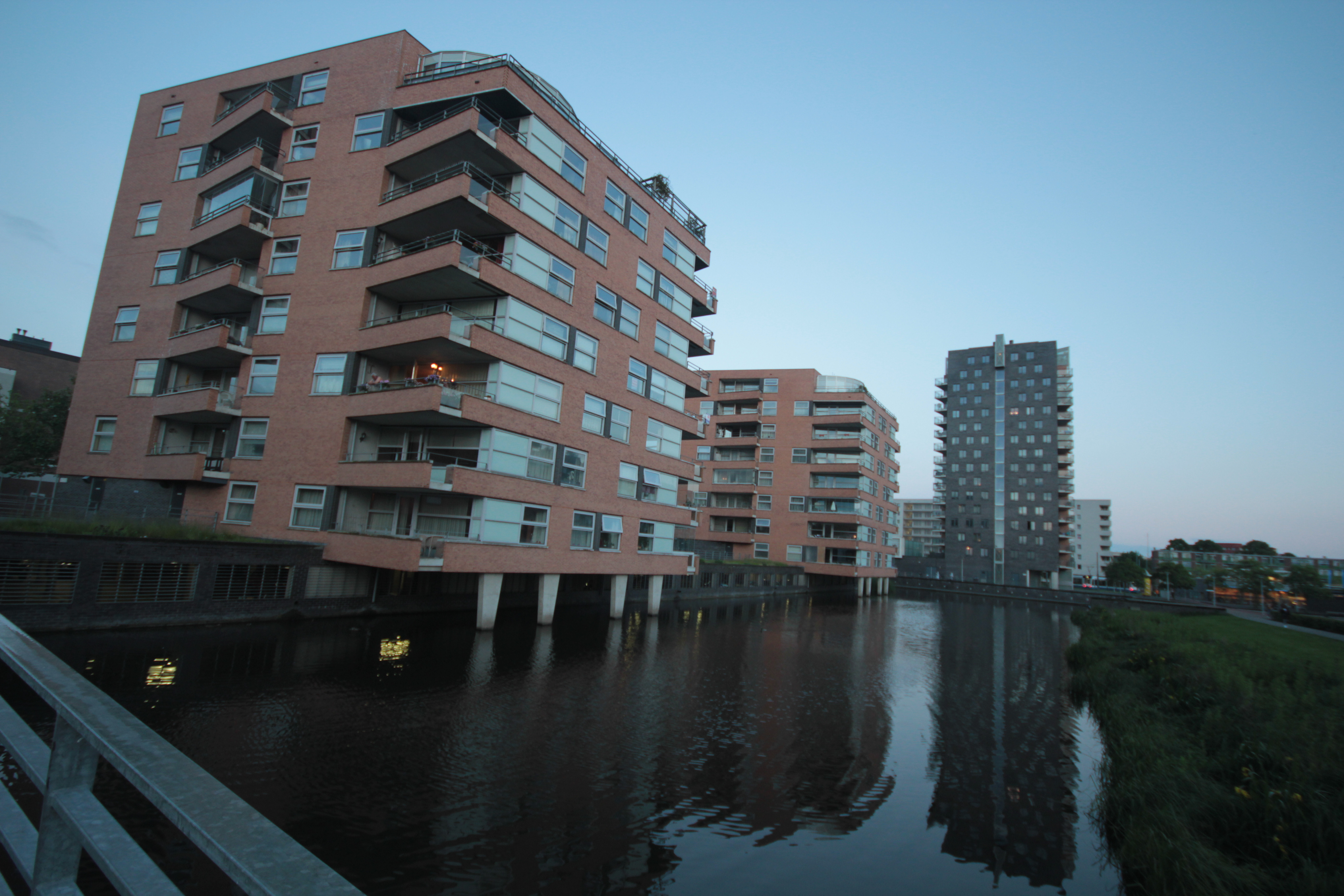 De Albardakade in Amsterdam-Geuzenveld. Juni 2012